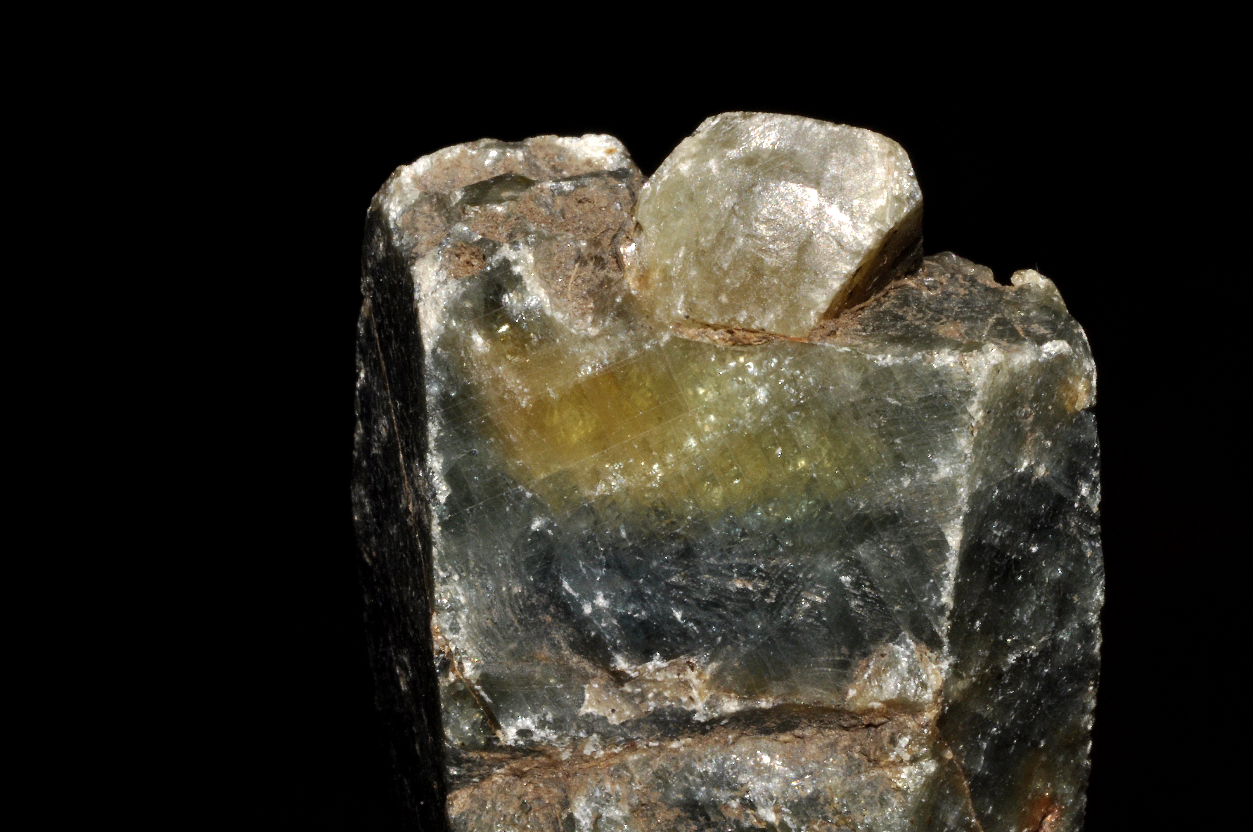 Cristaux bicolores de corindon var. saphir